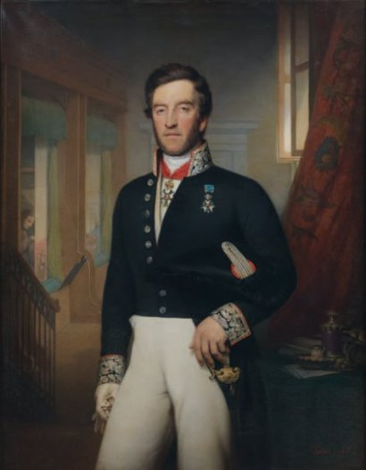 Portrait de Gaspard Lavocat, directeur de la Manufacture des Gobelins de 1833 À 1848, sur sa toile d'origine 145,5 X 113,5 cm, Signée en bas à droite : Lucas Abel (Versigny 1813 - ?)